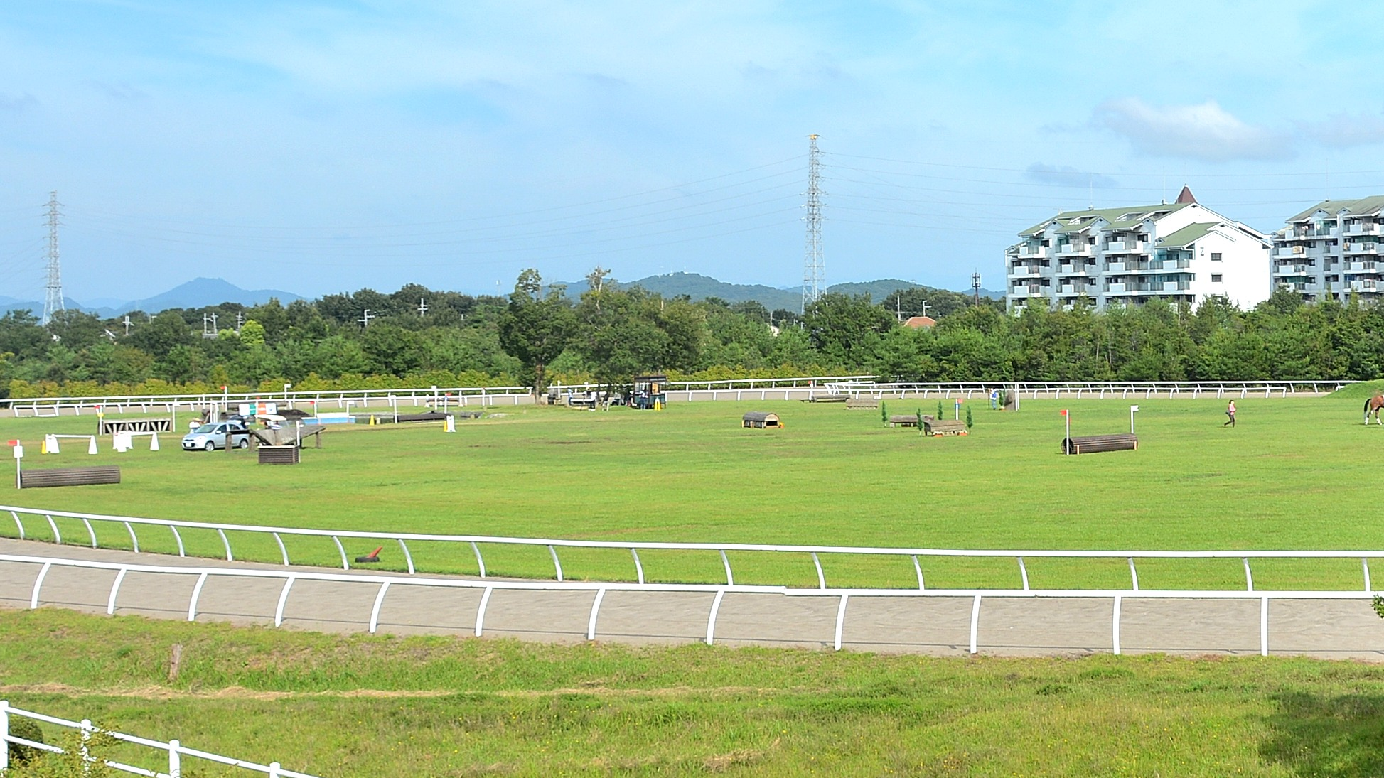 2015年9月5日（土）に三木ホースランドパークで行われた「第45回全日本総合馬術大会2015」の2日目にて、当日の競技開始前に「エクウスの森 緑の広場」の風景を撮影したもの。